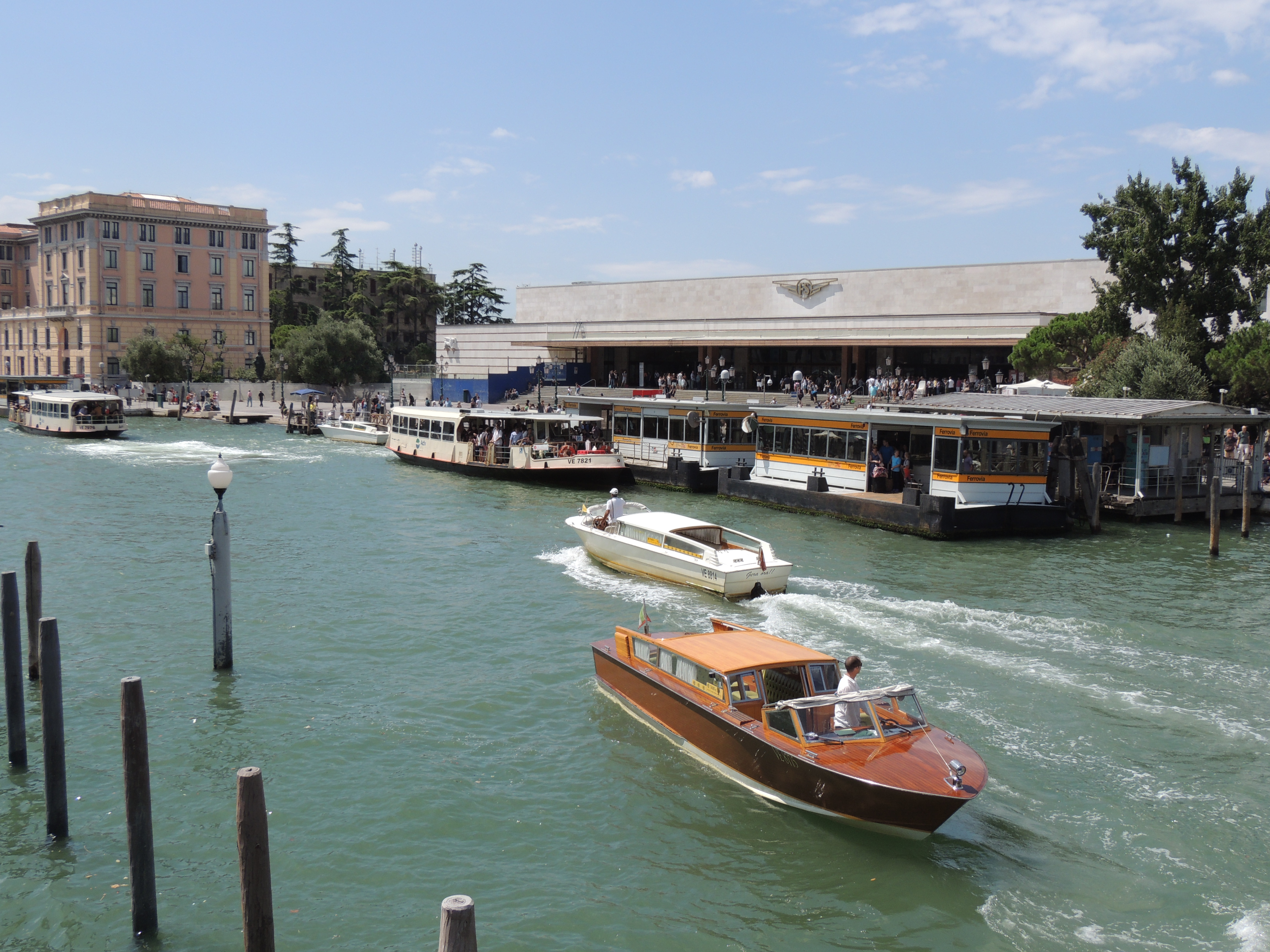 Vaporetto